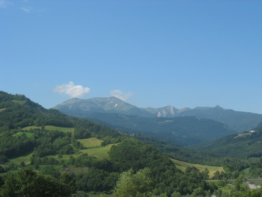 Filippo Fontana opera propria La foto riprende le alte Valli dei Cavalieri viste da Poviglio, nel versante reggiano. Sullo sfondo si riconosce l'Alpe di Succiso